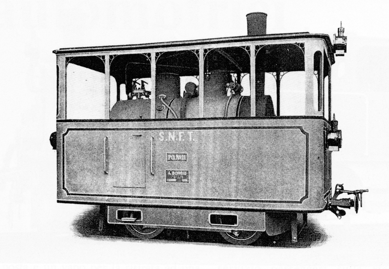 Foto di fabbrica della locomotiva a vapore, modello "Gamba de legn", 11 della Societa' Nazionale Ferrovie e Tramvie (SNFT)